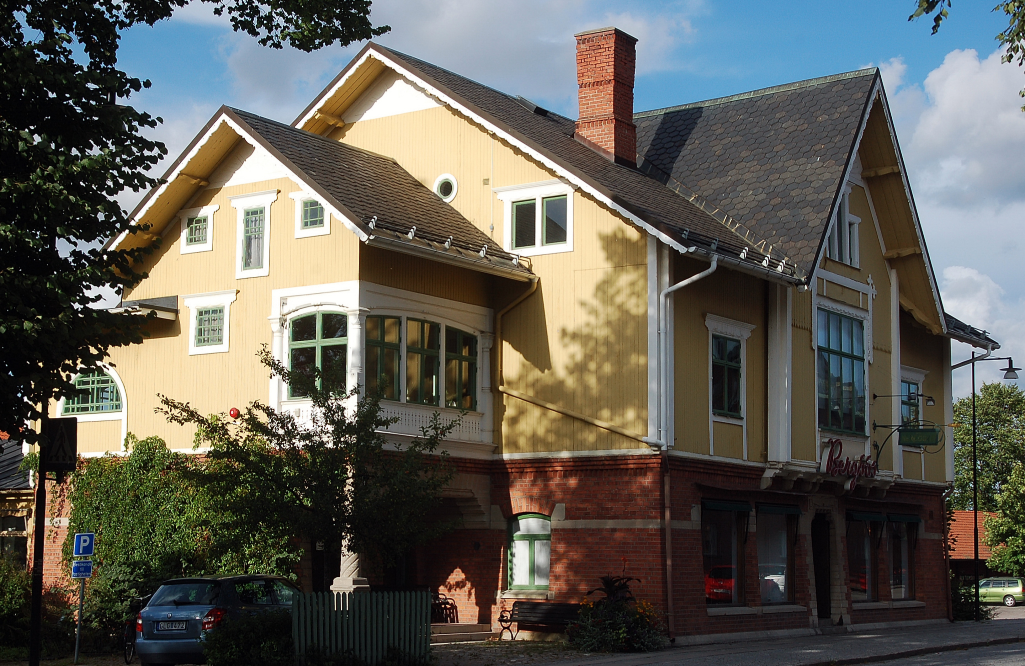 Huset sett från Storgatan